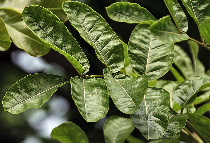 Sausage Tree Kigelia africana in Kolkata, West Bengal, India.